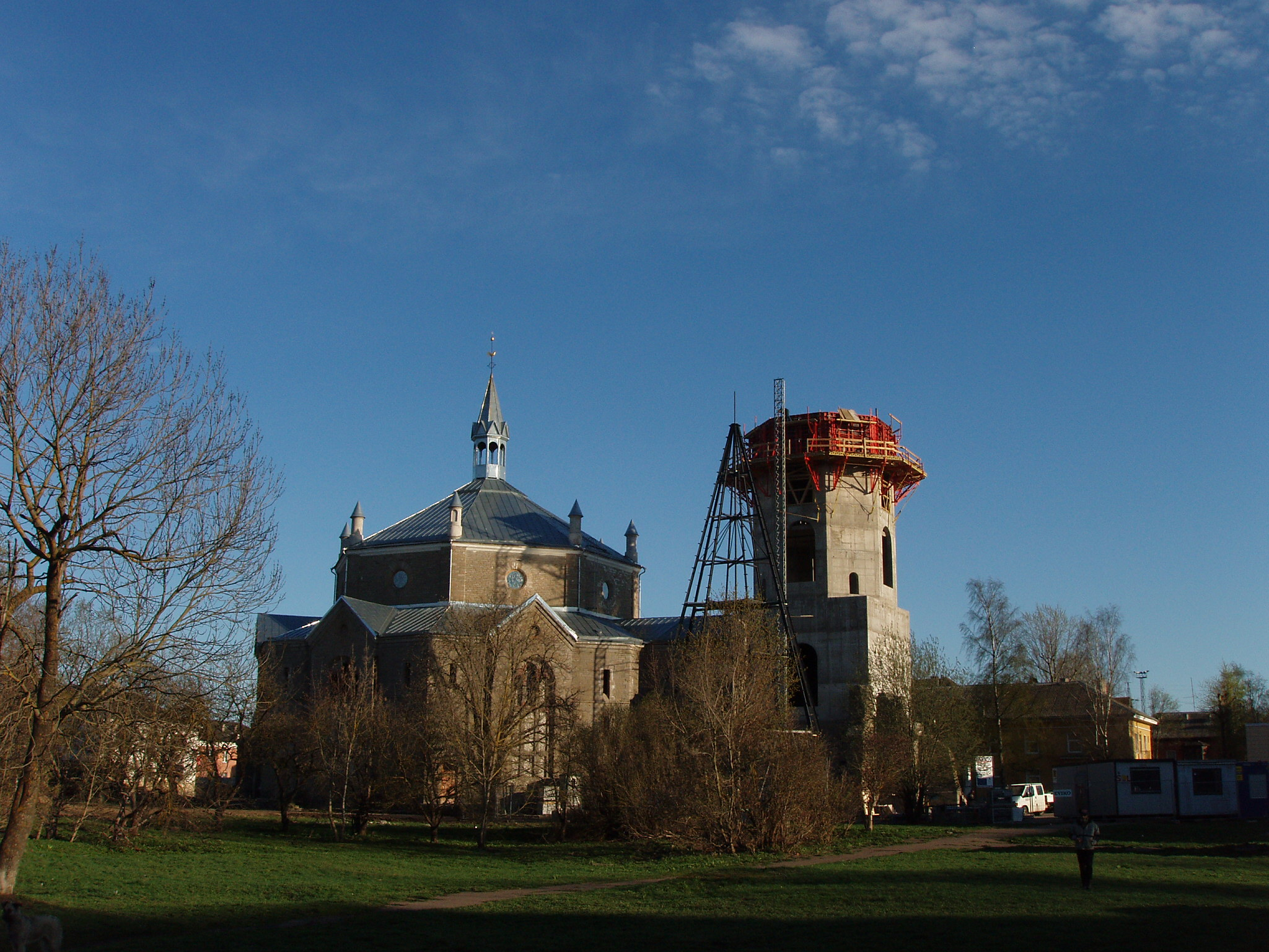 Narva Aleksandri Suurkirik